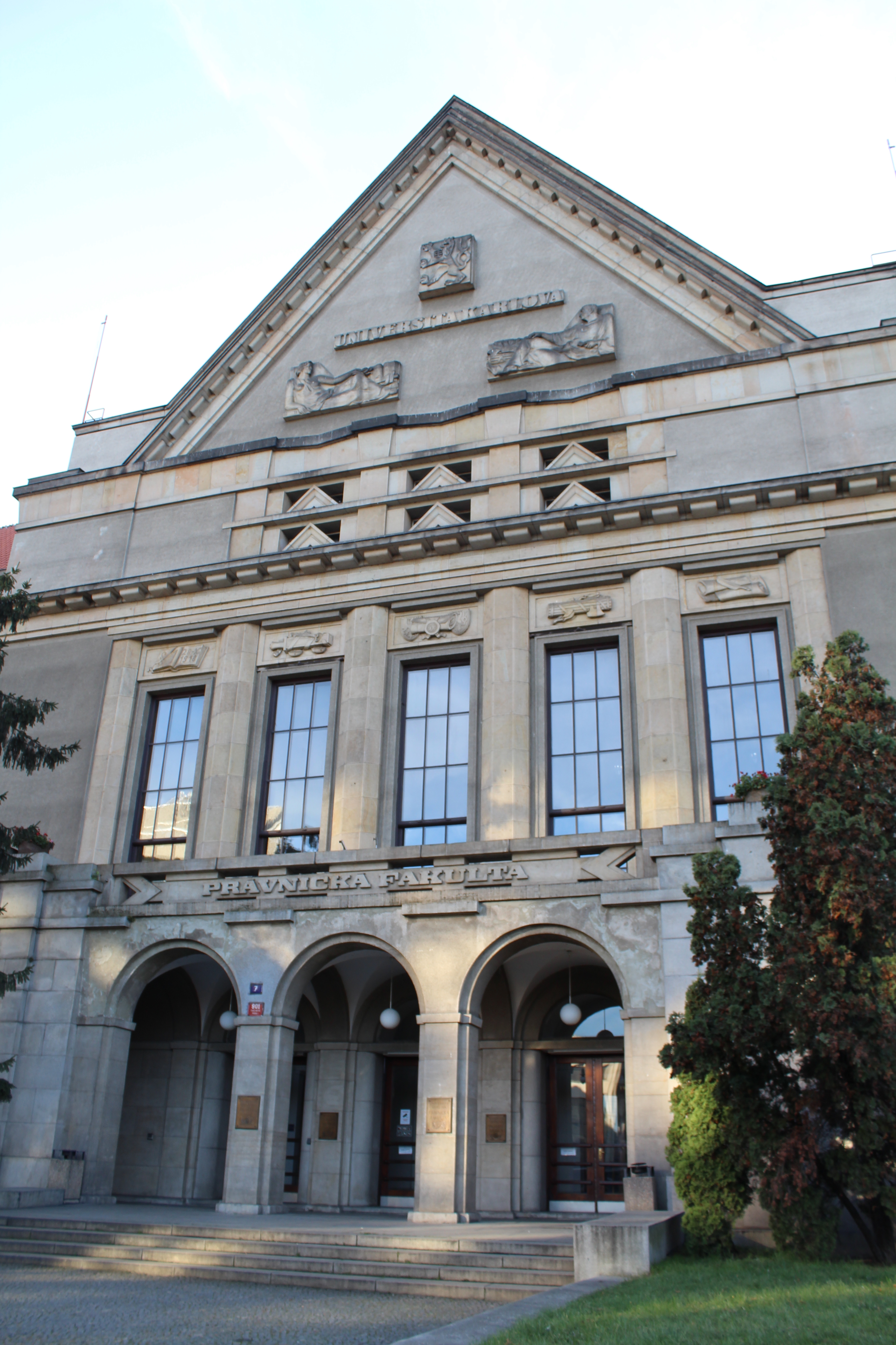 Faculté des droits de l'Université Charles de Prague.